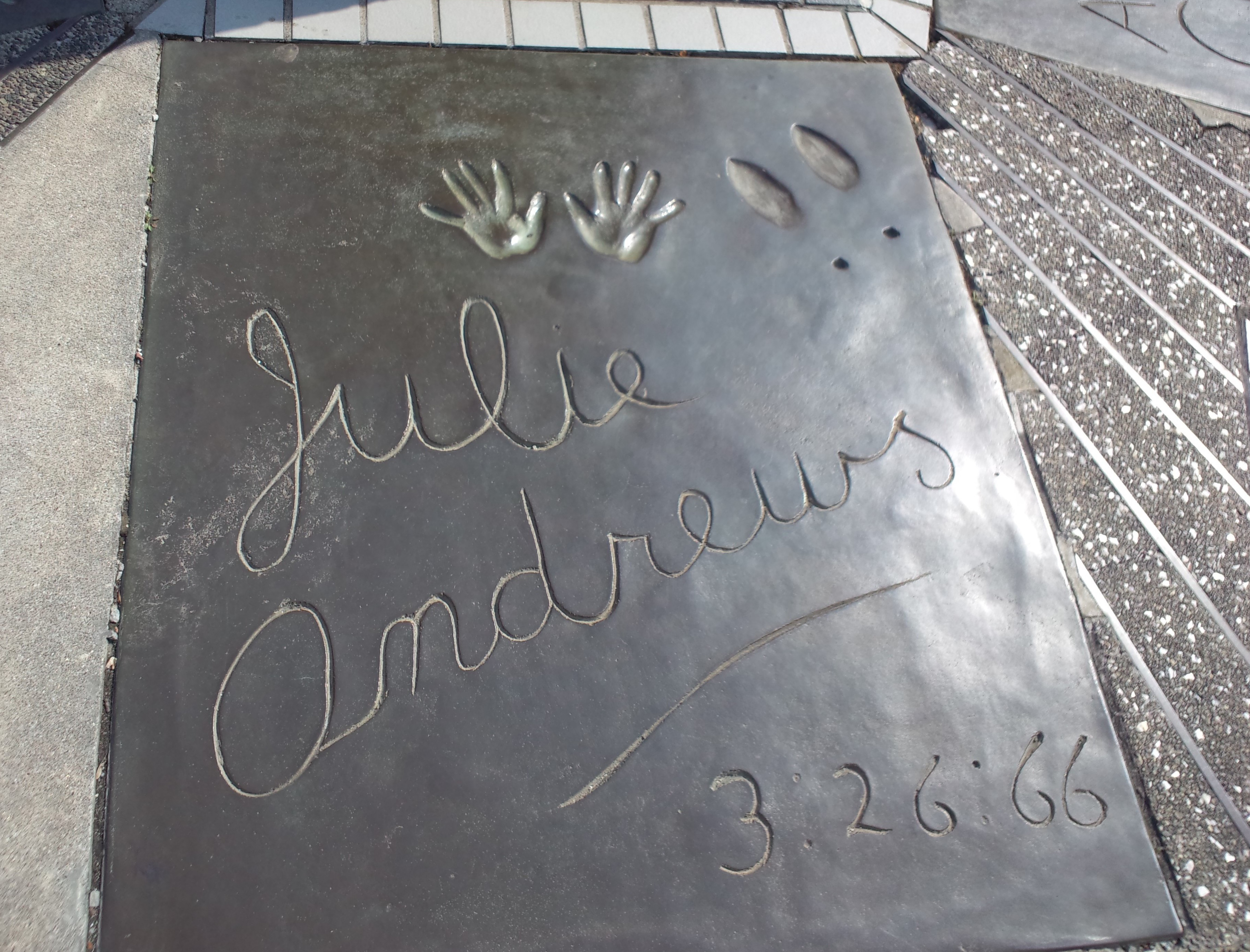 久屋大通公園 ジュリー・アンドリュースのハンドプリント